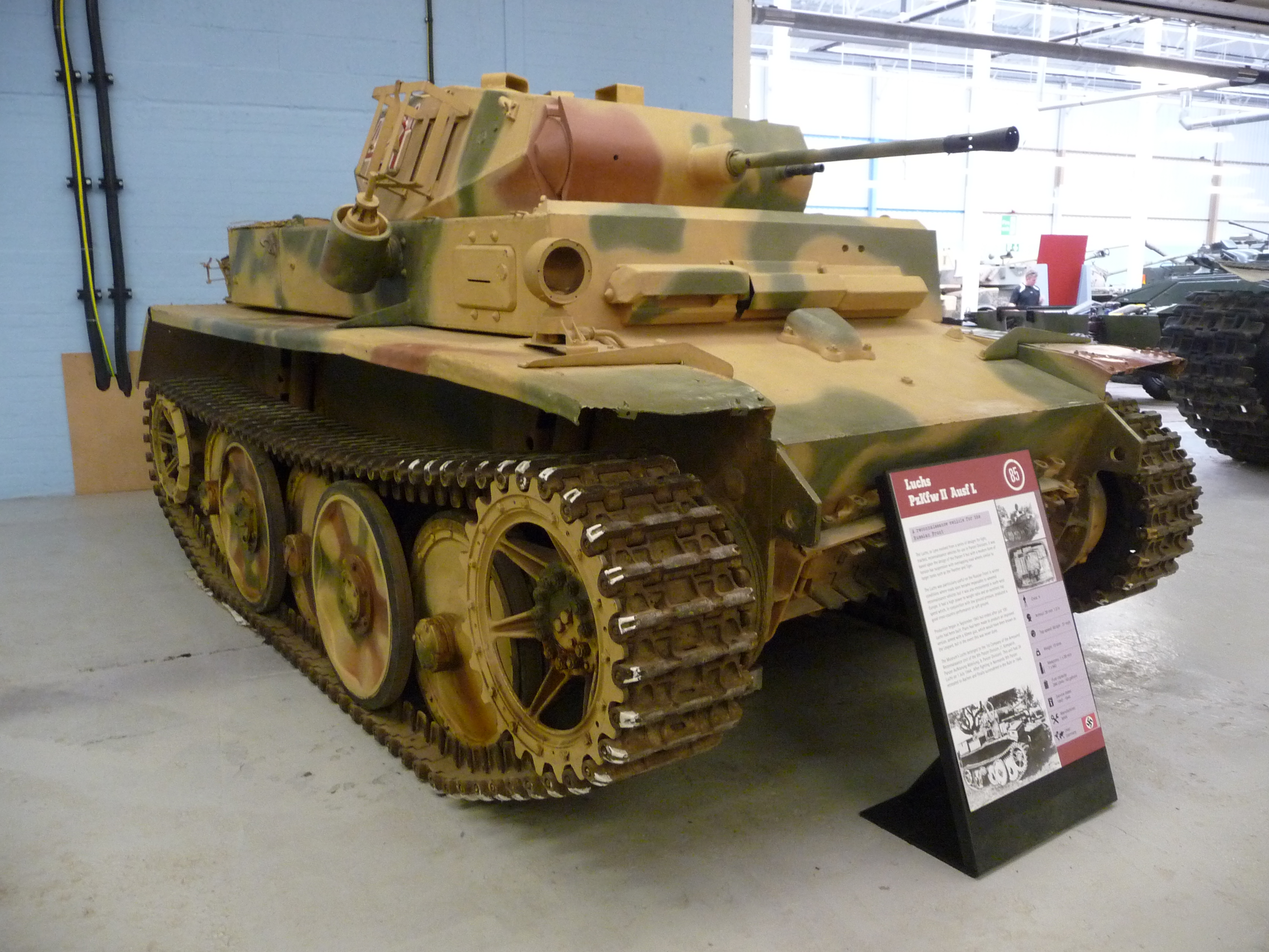 Sd Kfz 123 Panzerkampfwagen II Ausf L